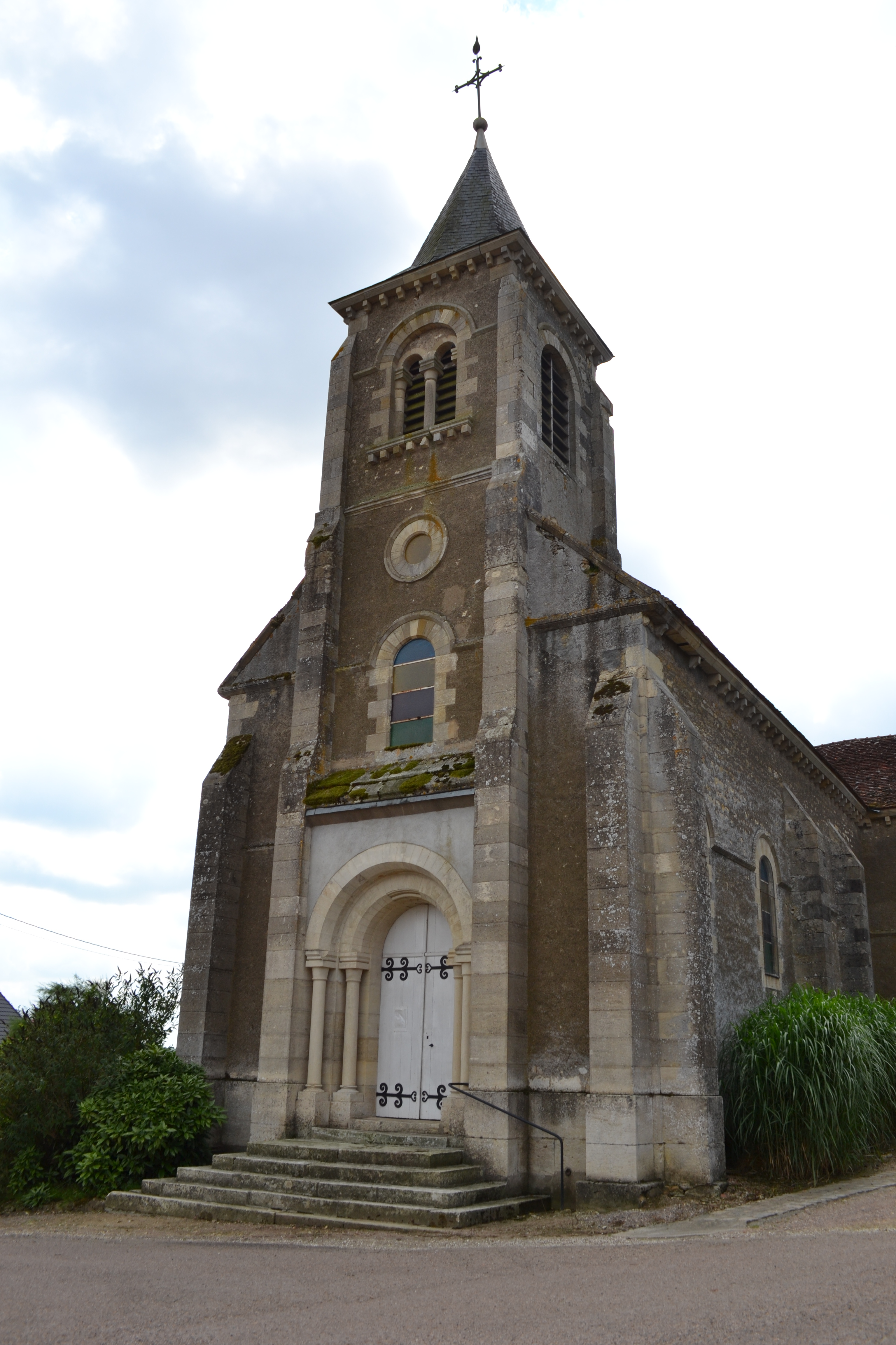 Église de La Celle-sur-Nièvre (58).